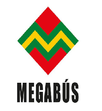 emblema de megabus.